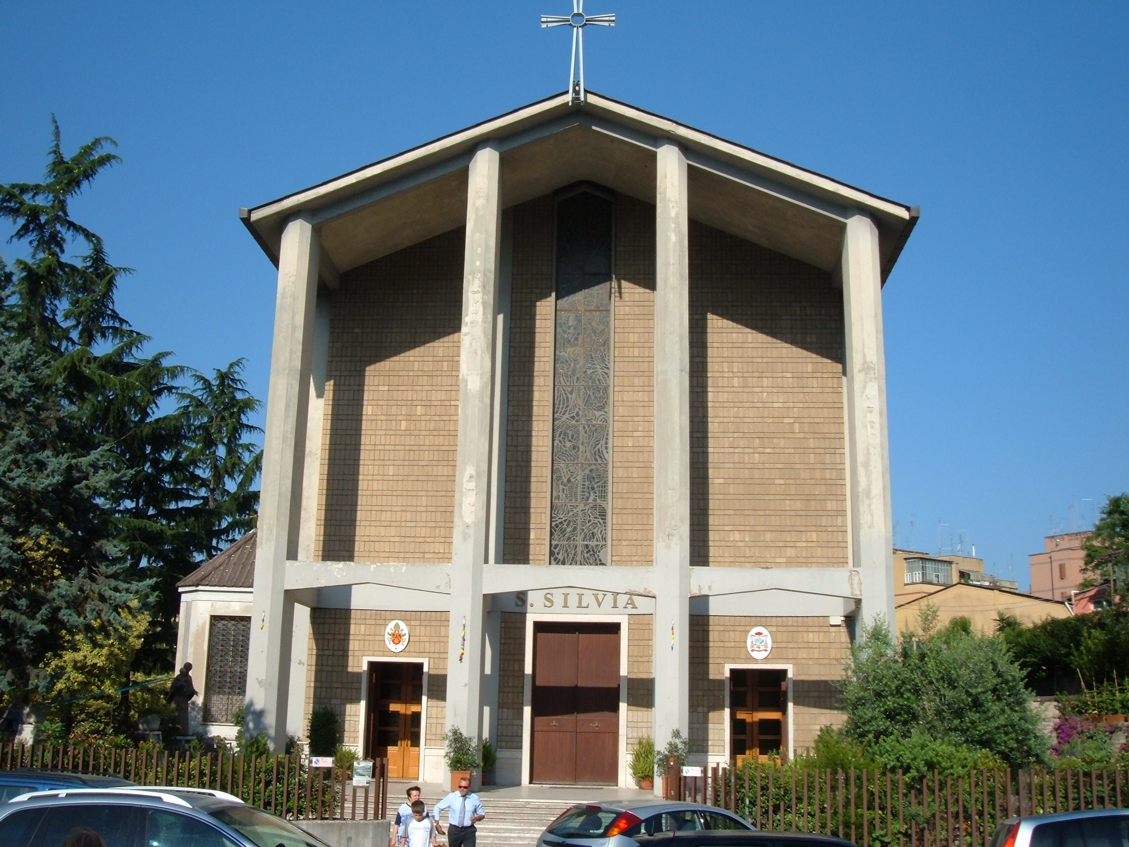 Chiesa di Santa Silvia, a Roma, nel quartiere Portuense.